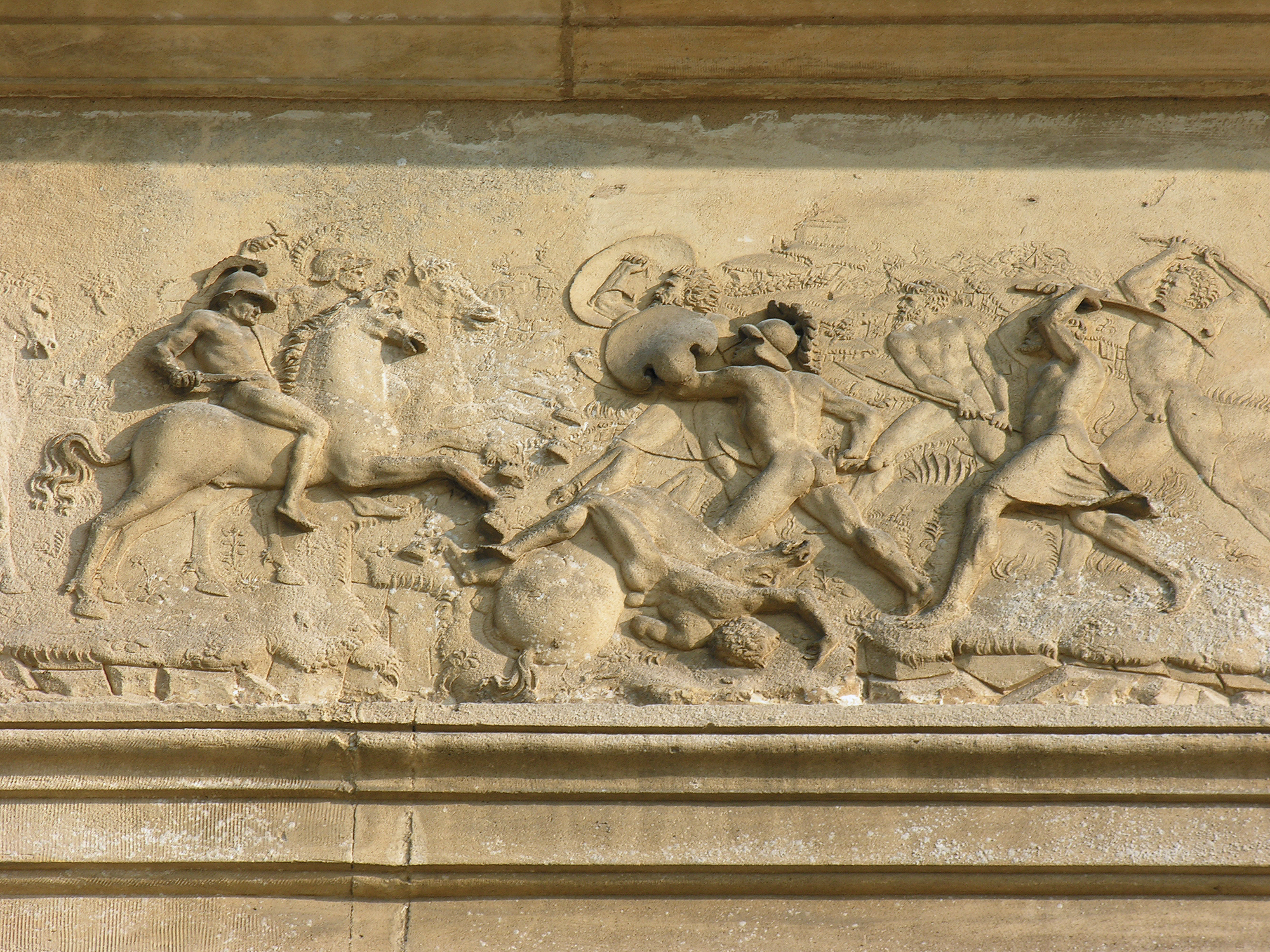 Scène de combat à l'Antique, sculptée au-dessus de la porte d'entrée du château du Grand Jardin.